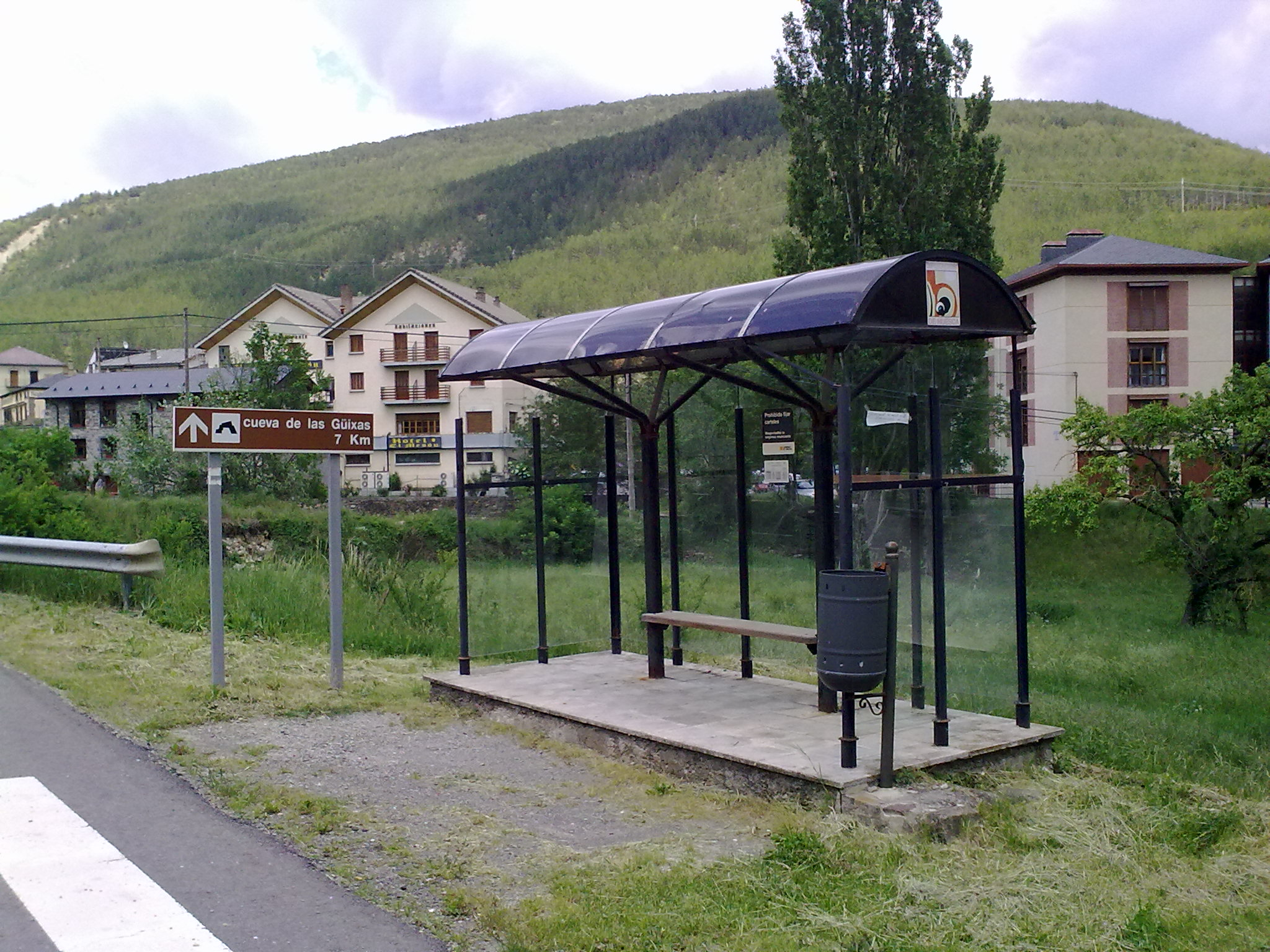 Castiello de Jaca le 23 mai 2010.